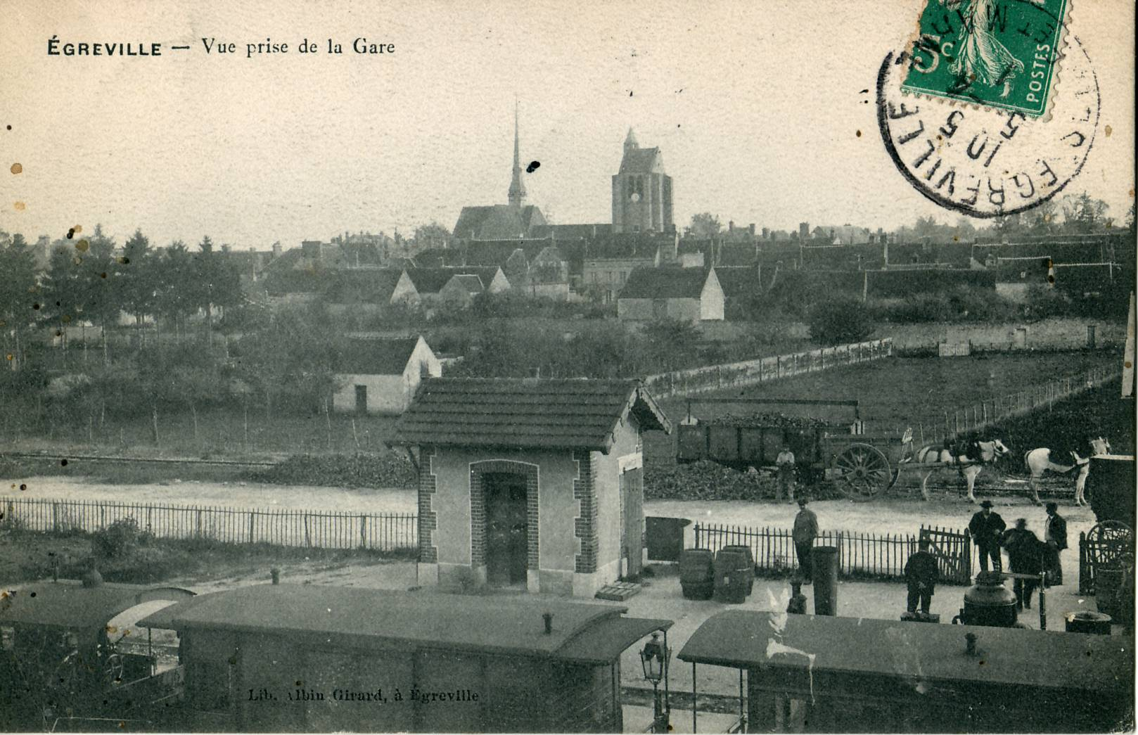 Carte postale ancienne éditée par Albin Girard à ÉgrevilleÉgreville : Vue prise de la GareLa gare était située à la jonction des lignes Montereau-Château-Landon et Sens-Egreville